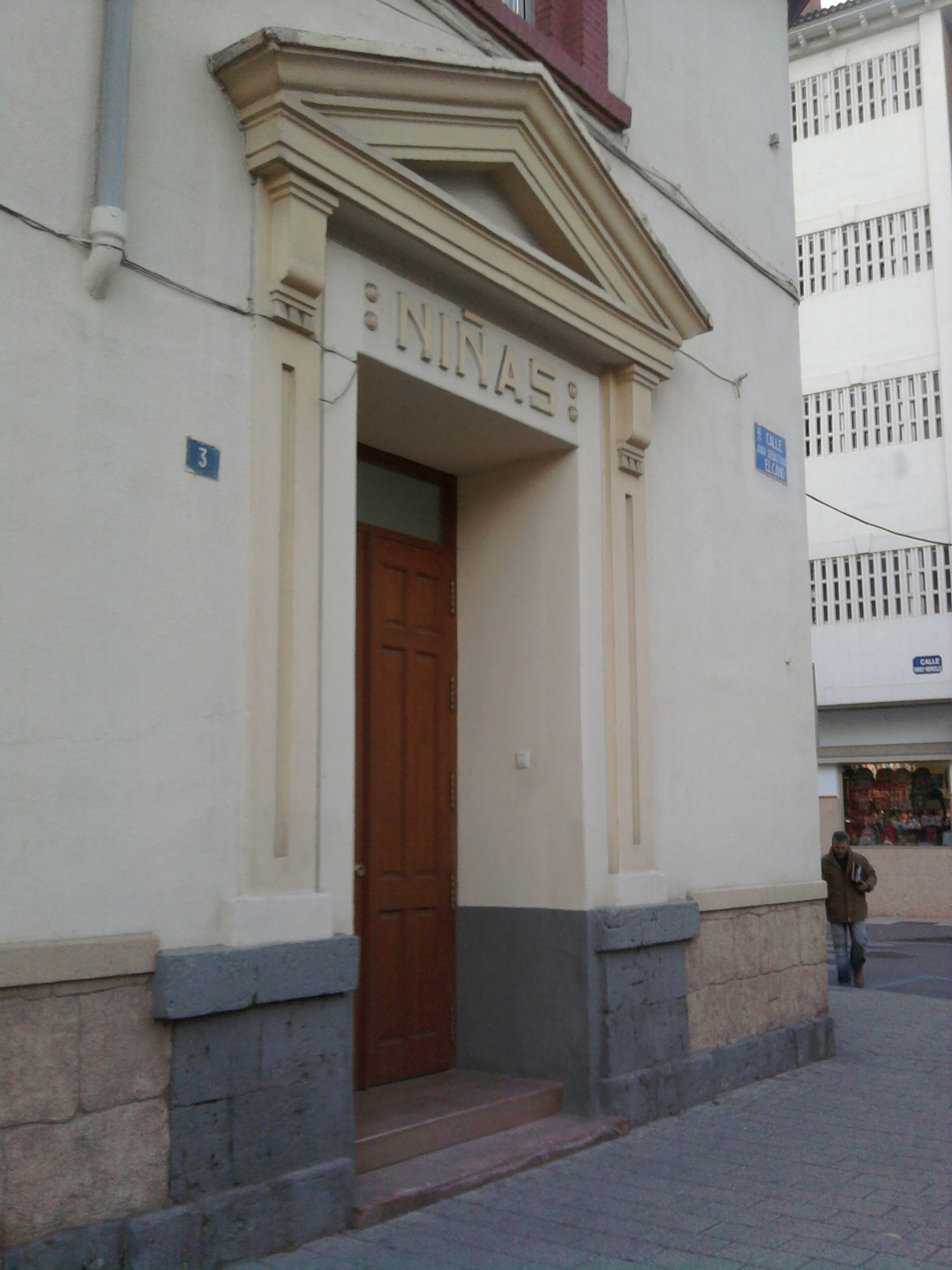 Letrero en piedra de una de las antiguas escuelas de Albacete